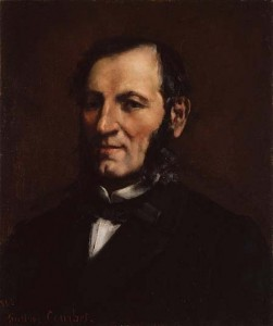 Ritratto di Gustave Chaudey (1817-1871), olio su tela, 62 x 49 cm, firmato, Troyes, Musée d'art moderne